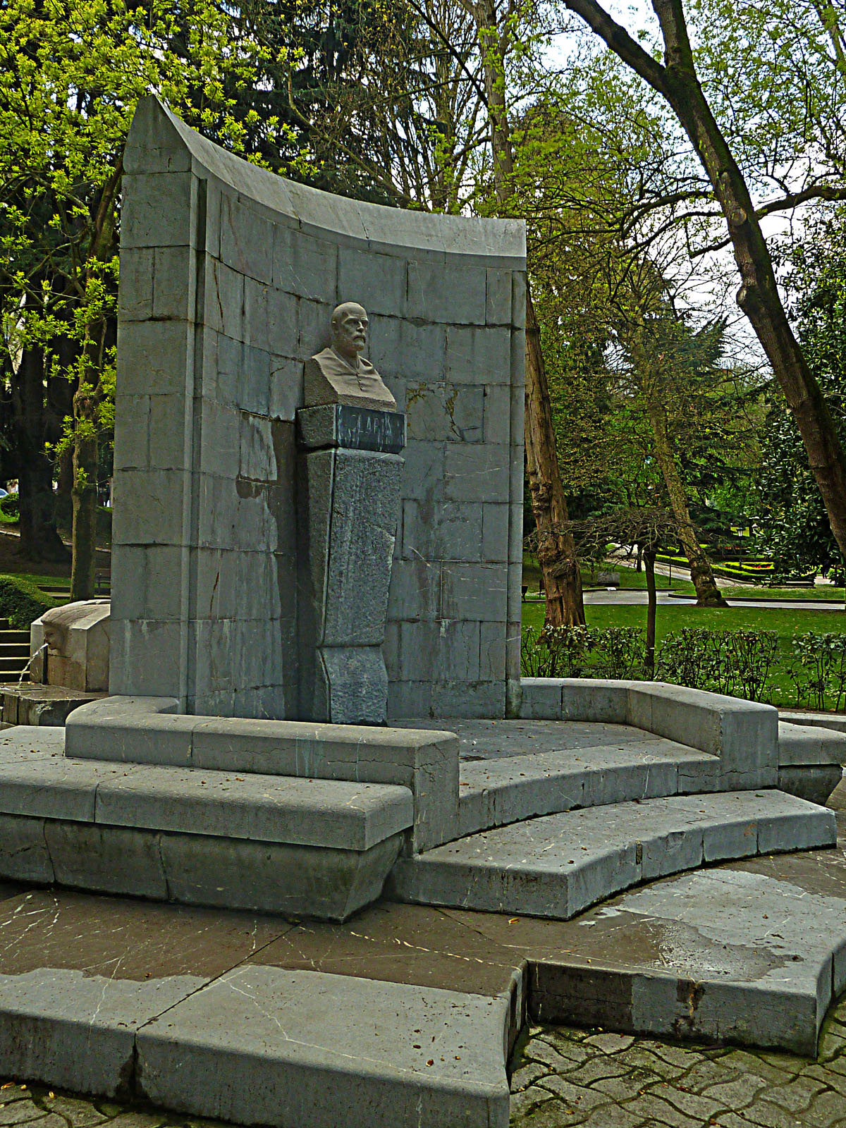 Asturias